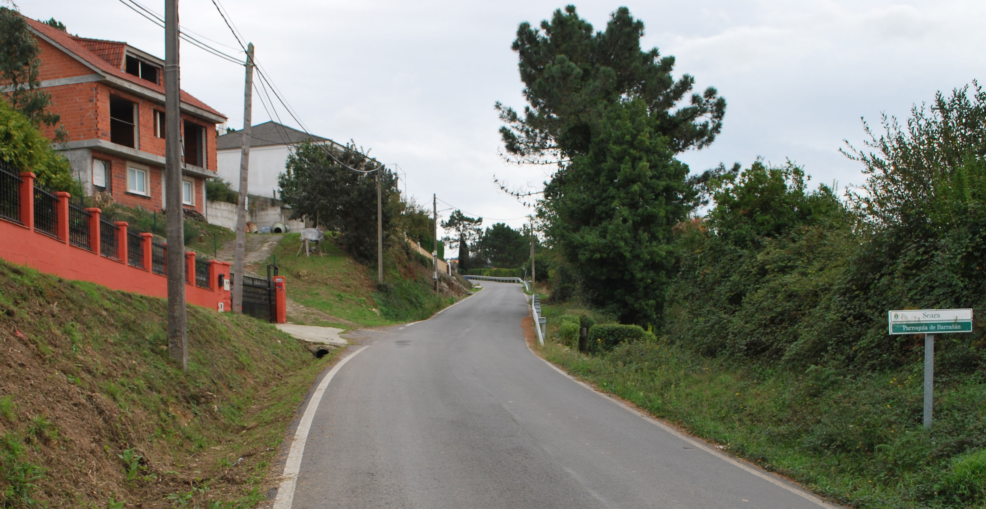 Vista de Seara en Barrañán Arteixo A Coruña Galiza